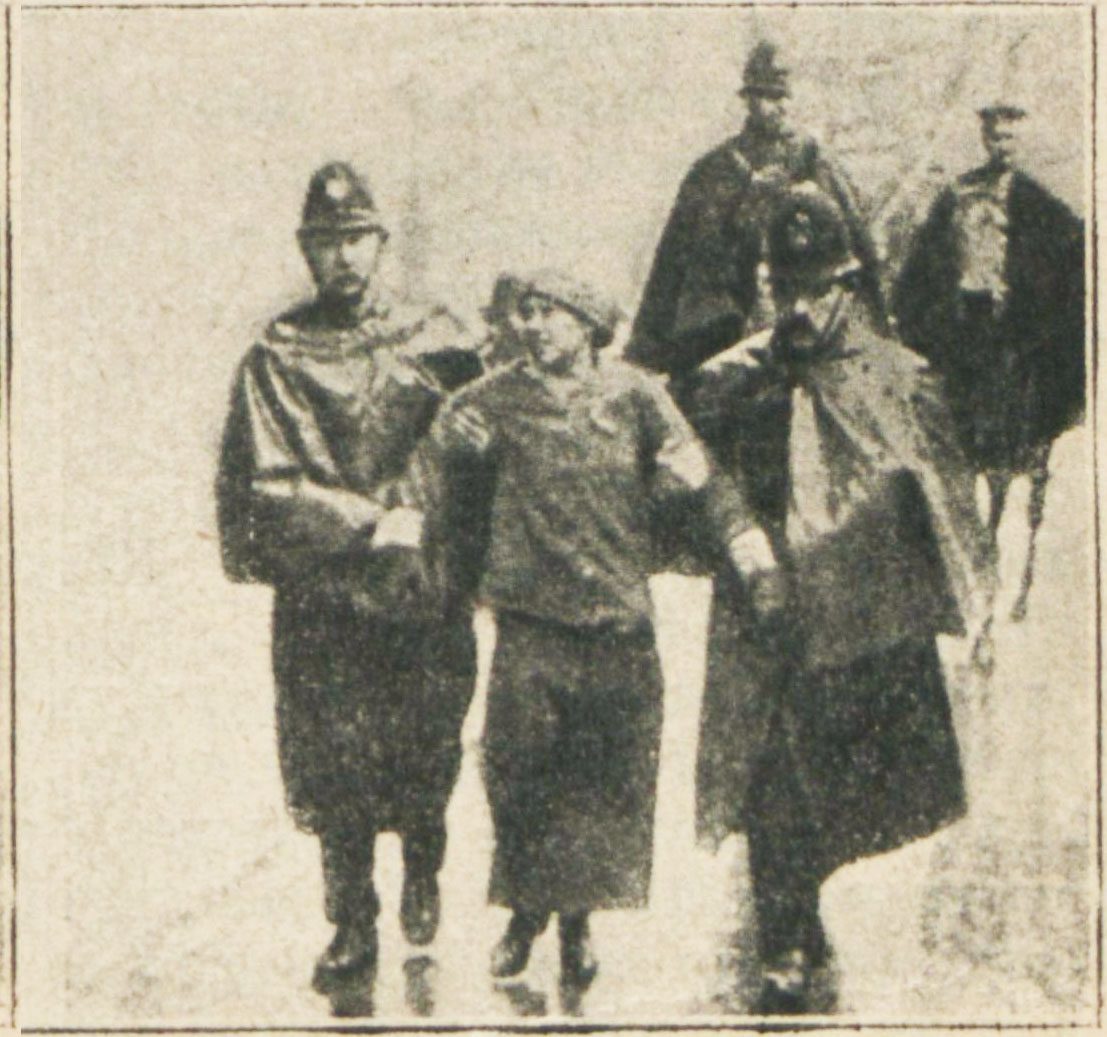 Арешт суфражистки Річардсон після пошкодження картини Веласкеса "Венера з люстерком"